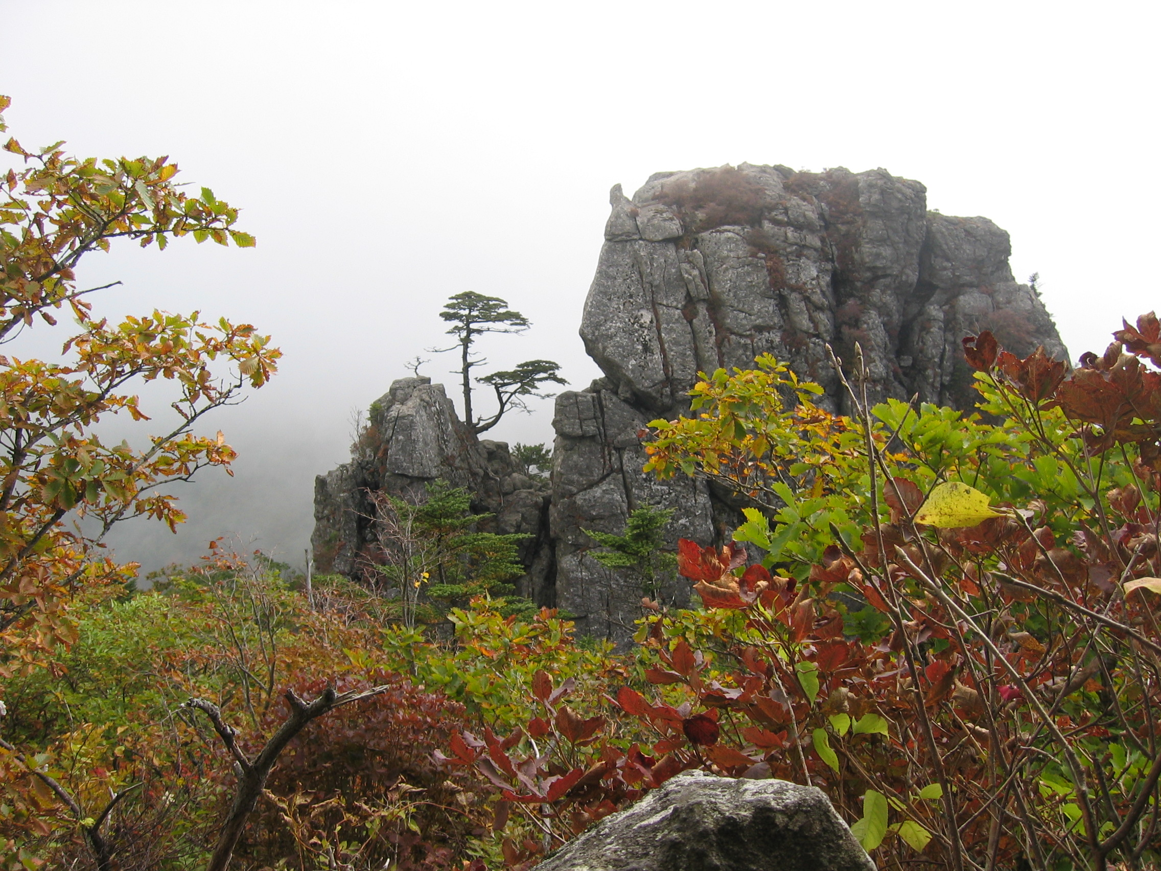 2006년 대한민국 지리산의 모습 The scenery of Jirisan, in South Korea, 2006